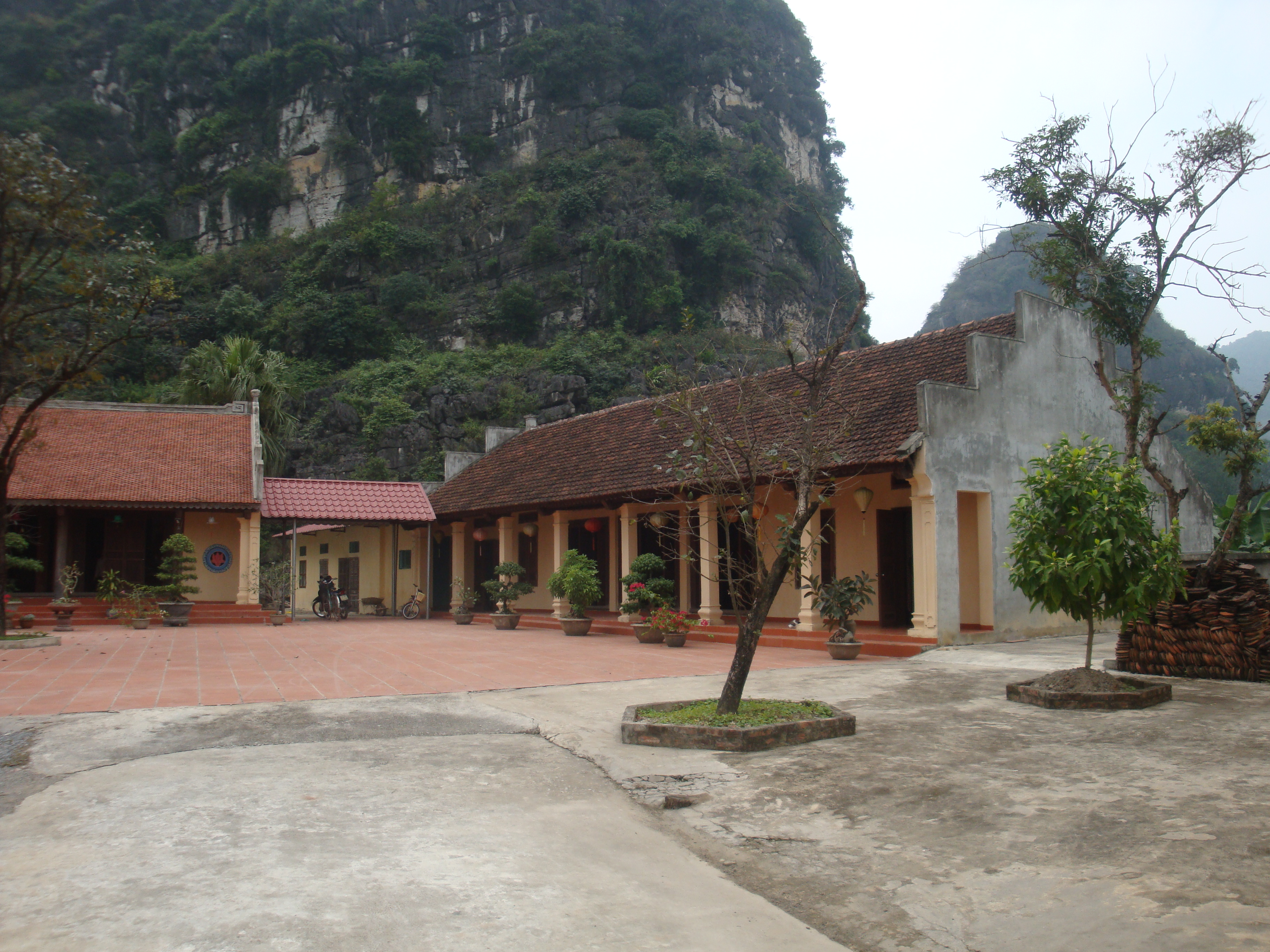 chùa Duyên Ninh ở cố đô Hoa Lư, Ninh Bình